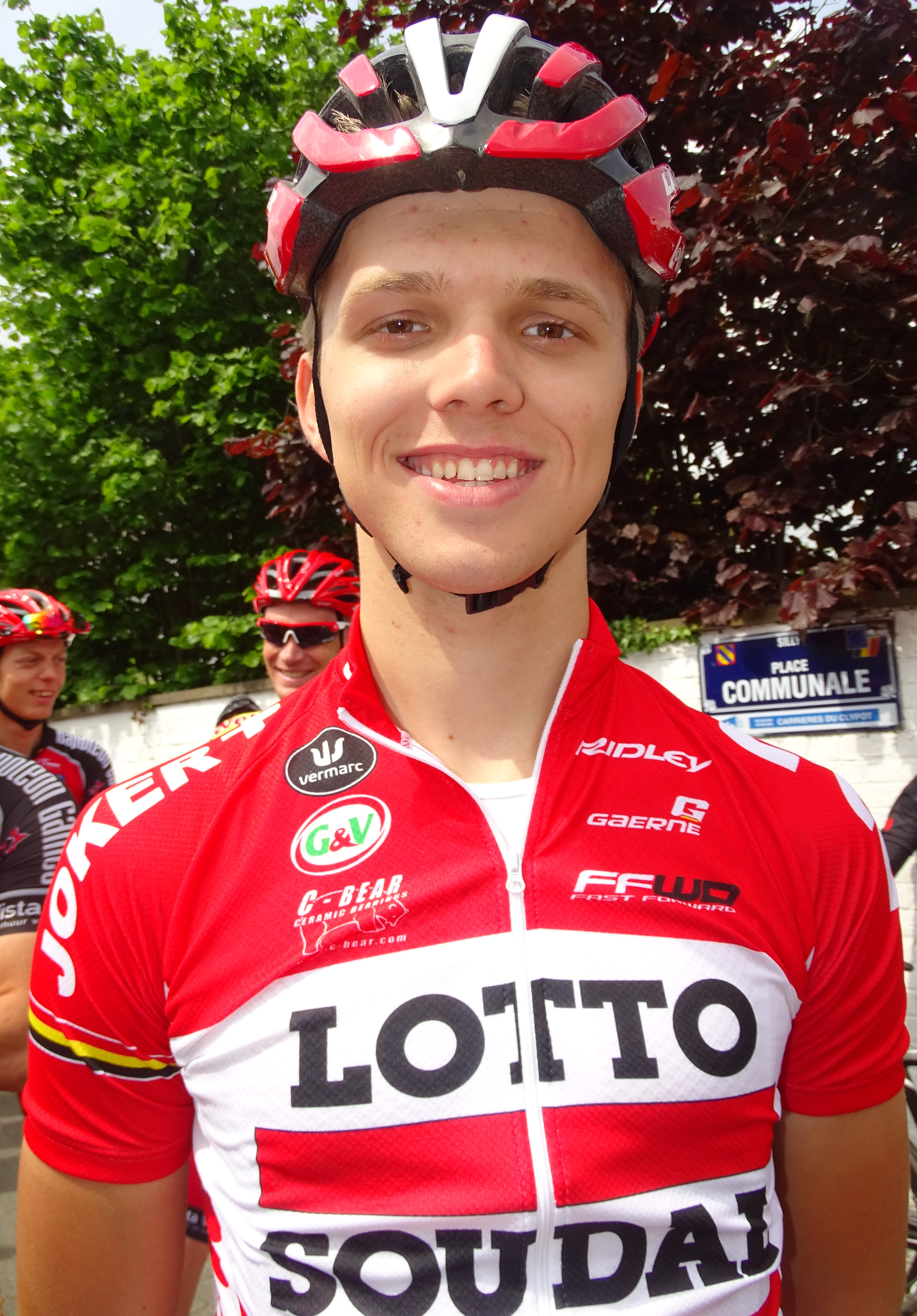 Reportage réalisé le dimanche 17 mai à l'occasion du départ du Grand Prix Criquielion 2015 à Silly, Belgique.